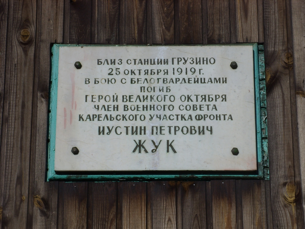 Памятная табличка